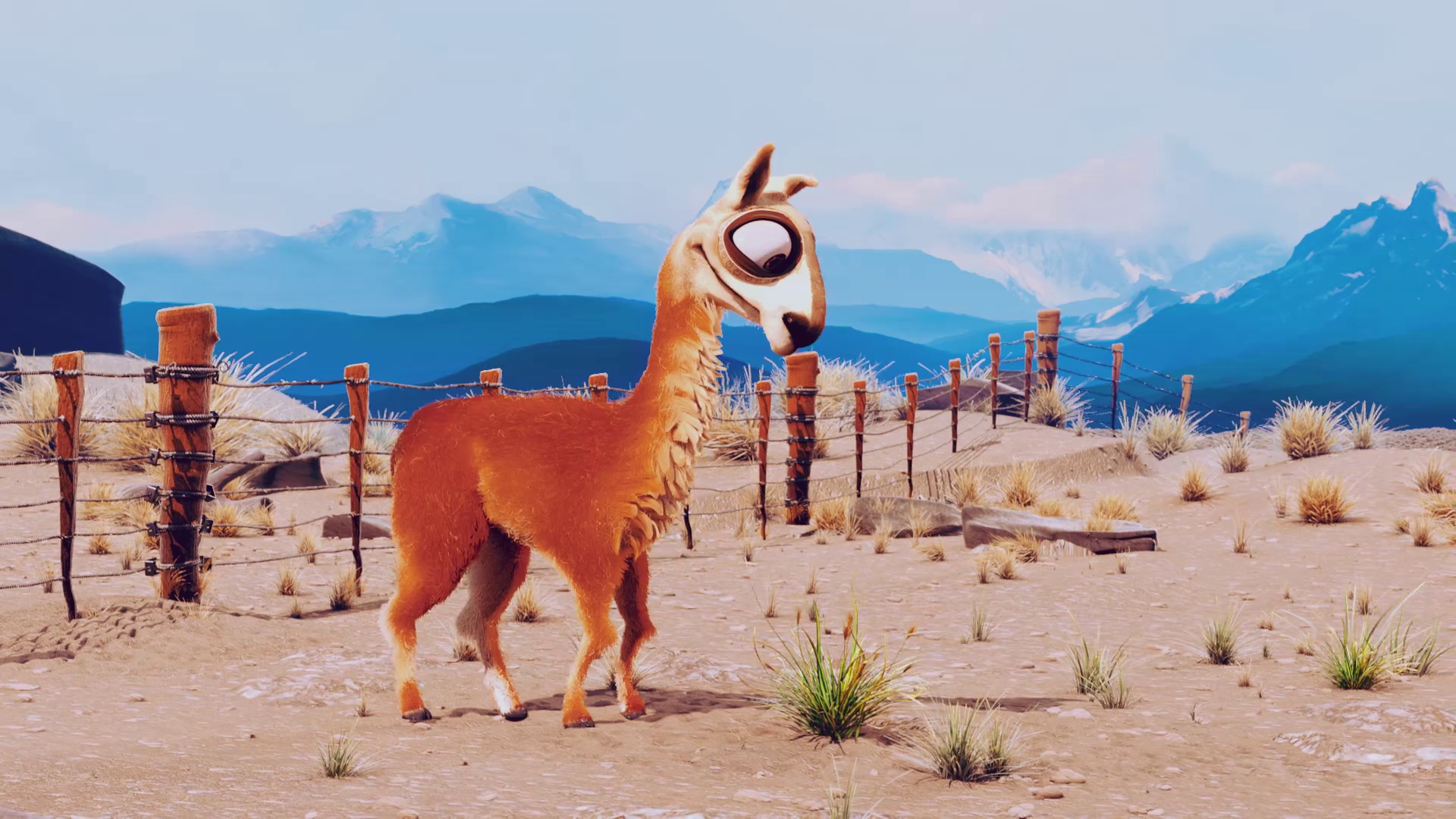 A frame from the short film Caminandes: Gran Dillama